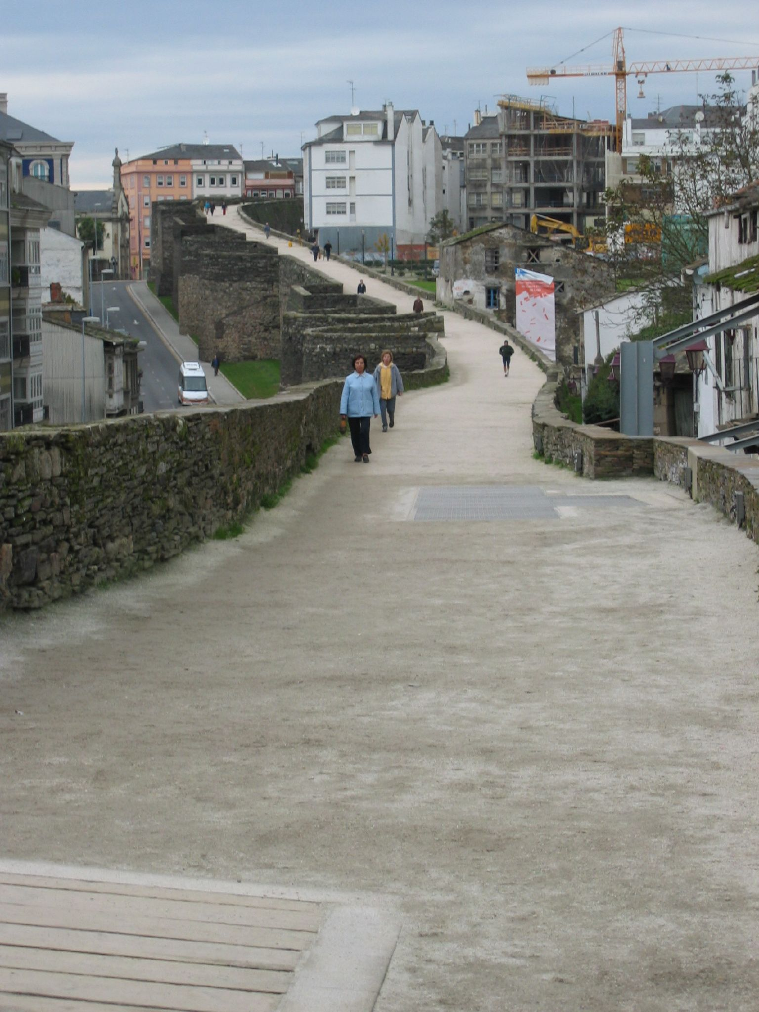 Murallas de Lugo